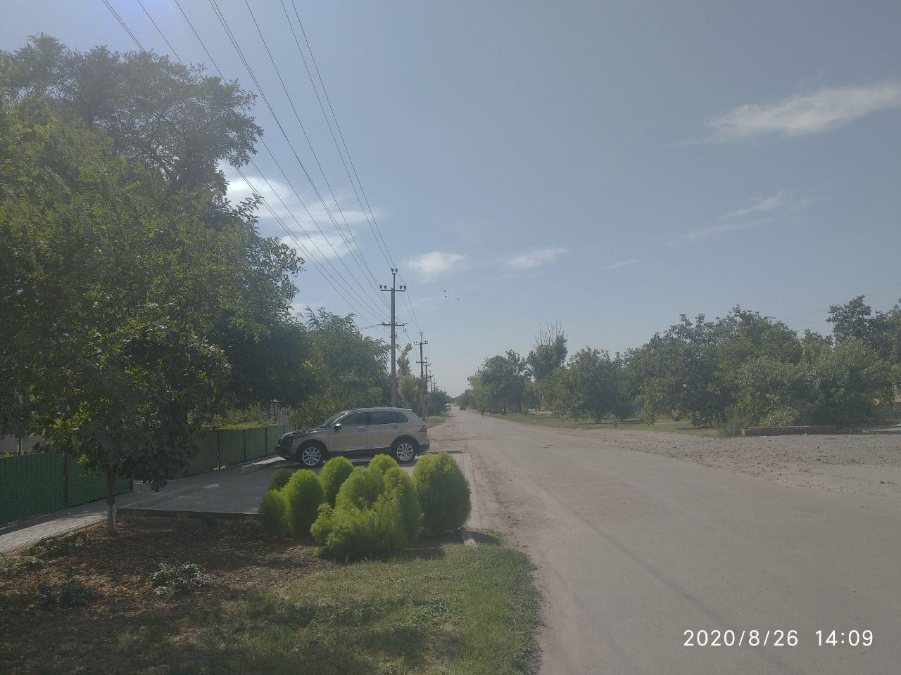 Улица